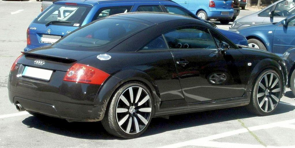 Audi TT Coupé